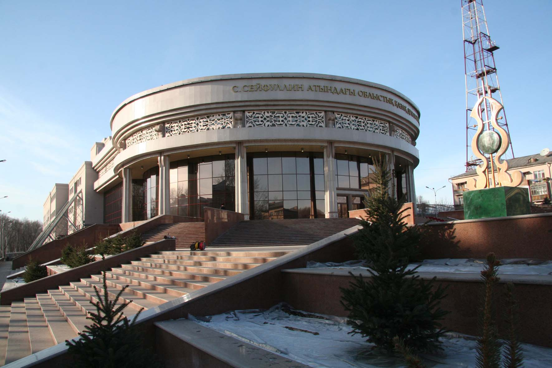 Карагандинский областной казахский драматический театр имени С.Сейфуллина